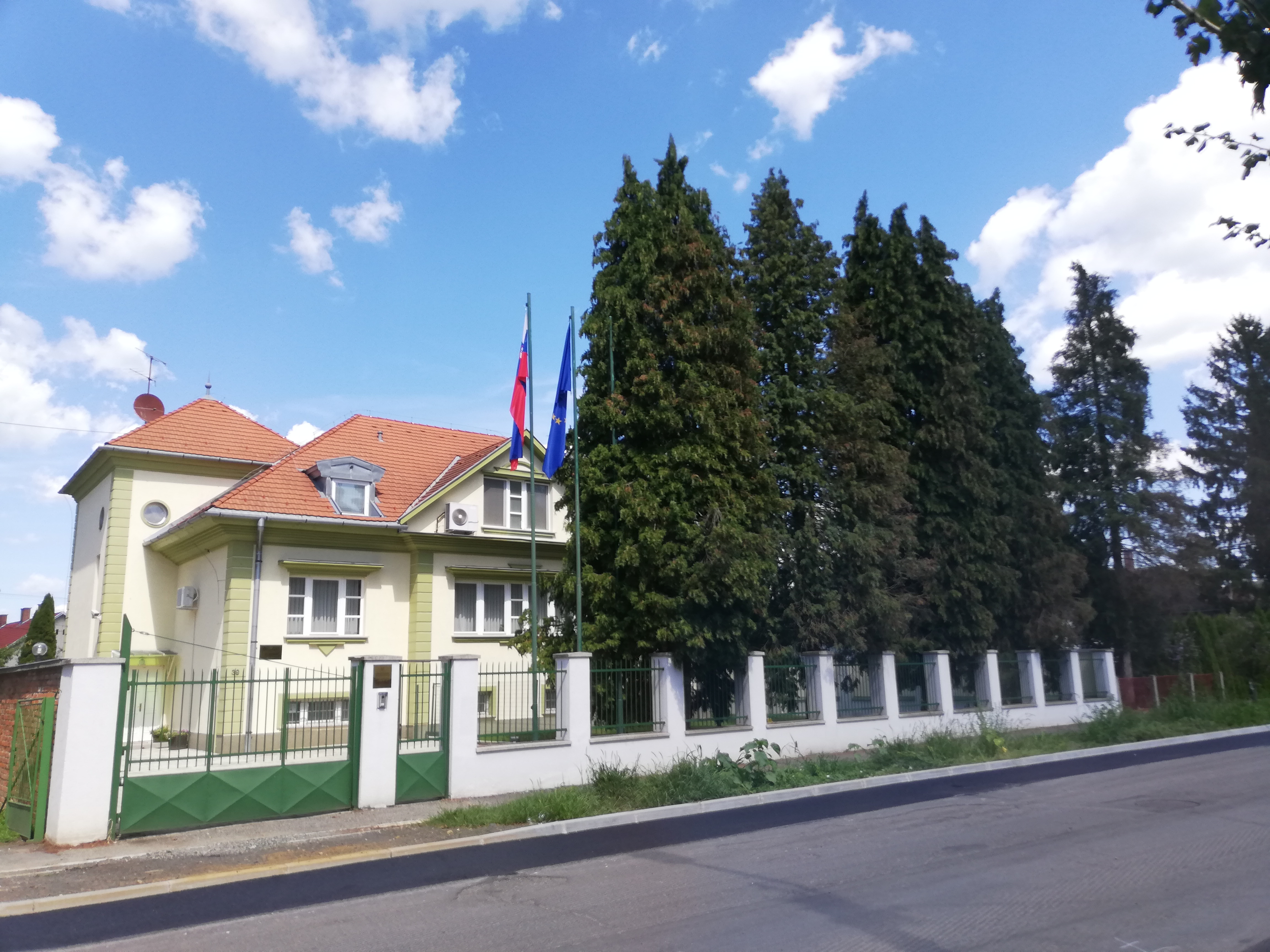 Szlovén főkonzulátus, 9970 Szentgotthárd, Kossuth Lajos u. 39.